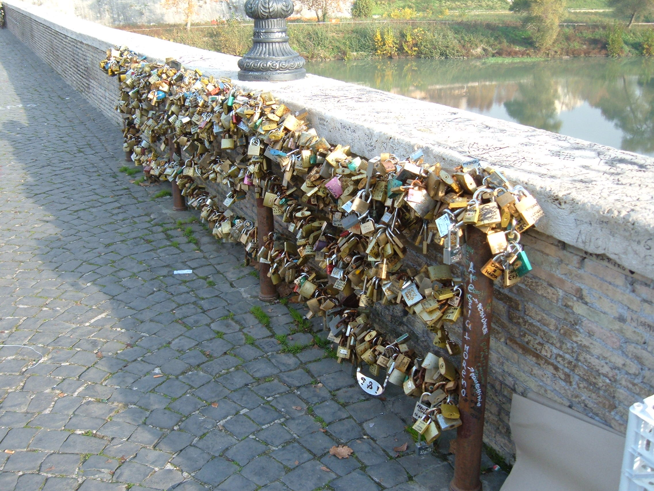 Lucchetti di Ponte Milvio.